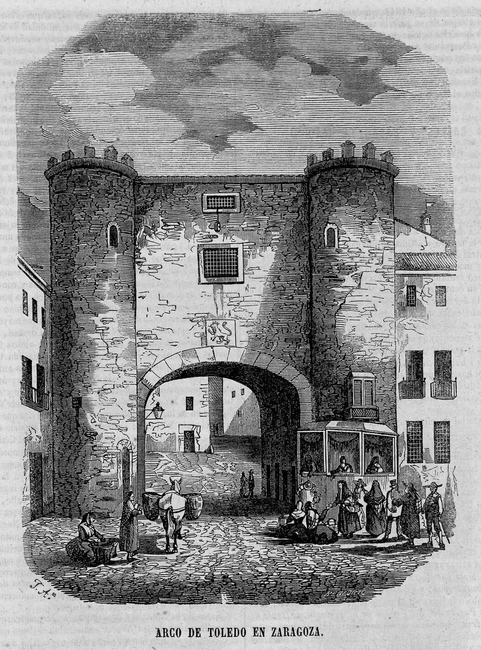 Arco de Toledo en Zaragoza.